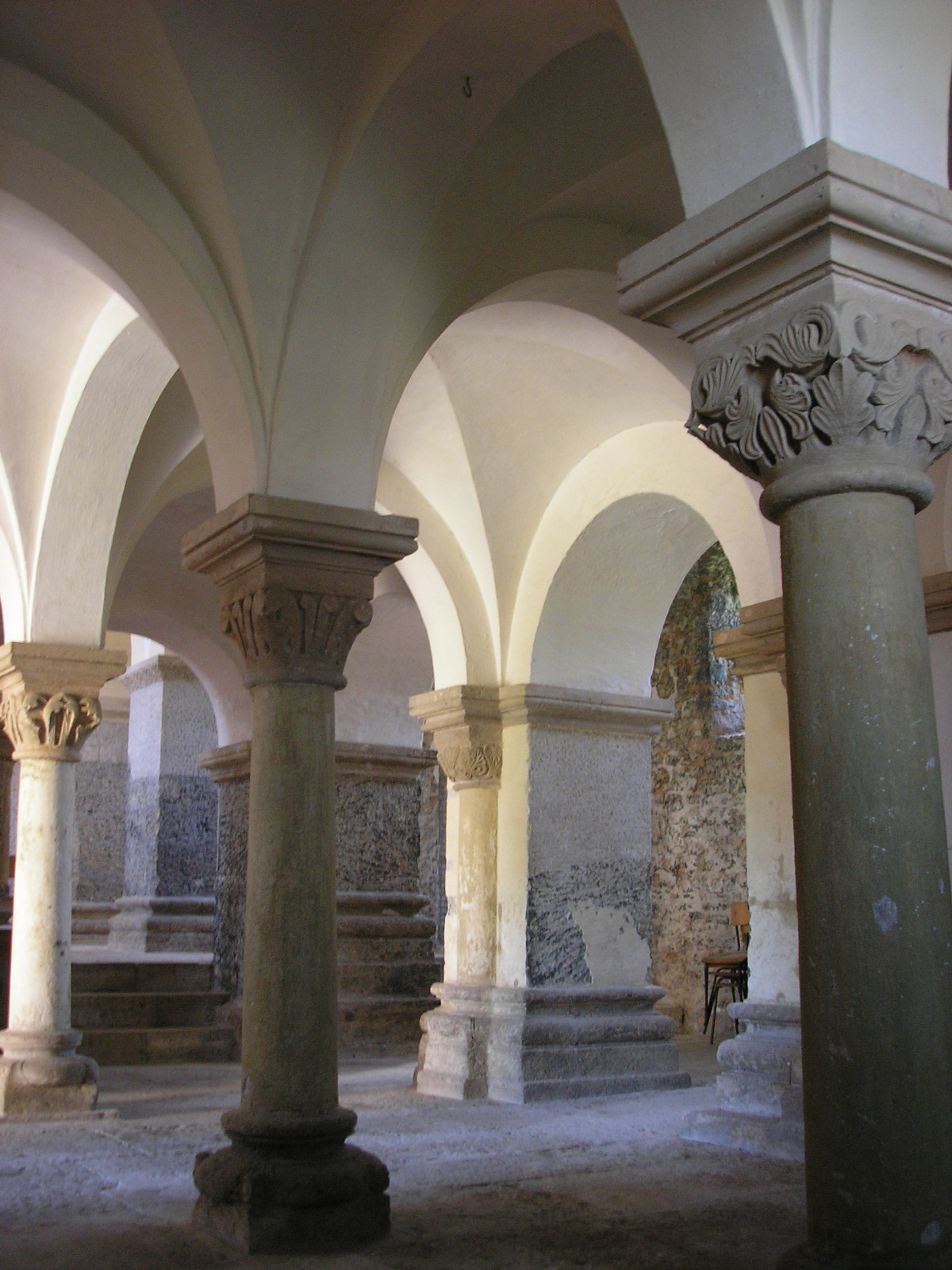 Die Krypta der Klosterkirche Münchenlohra (Thüringen).